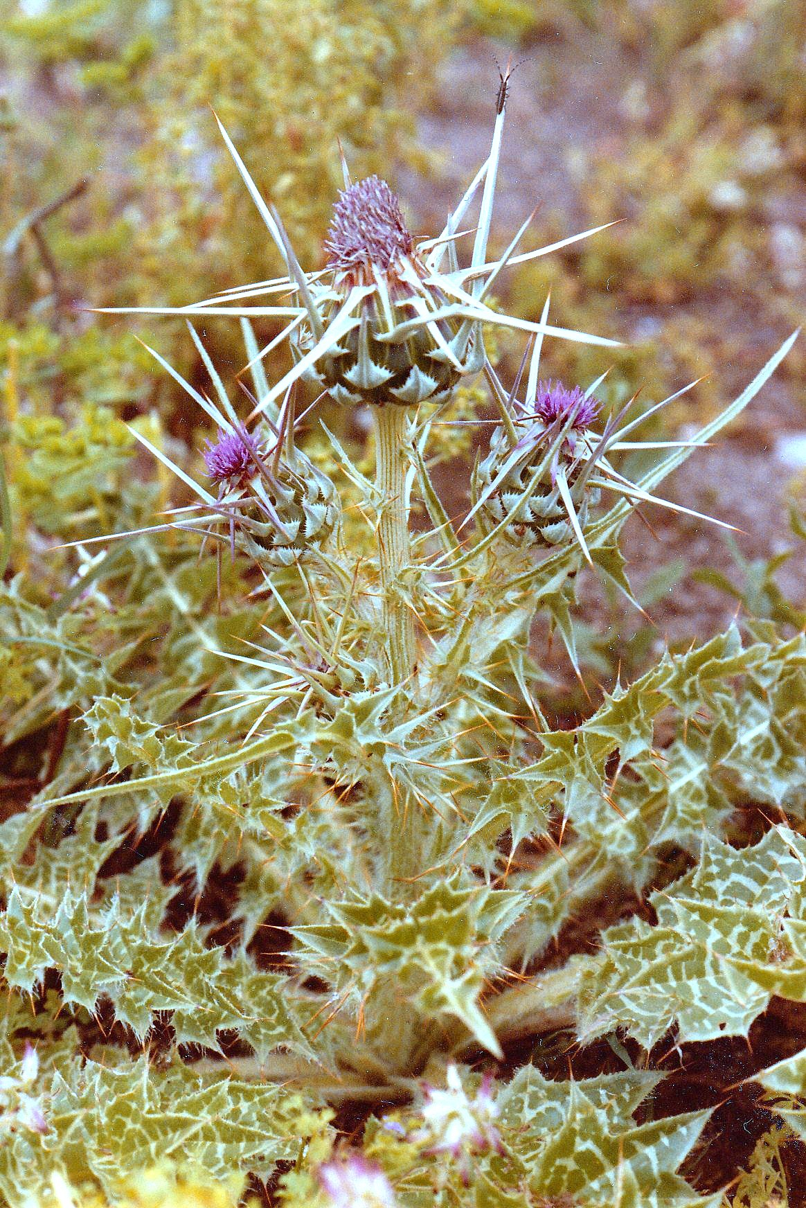 Silybum eburneum (cardo zapero) - Capítulos en antesis. - El Salitre, Albatera (Provincia de Alicante, España).